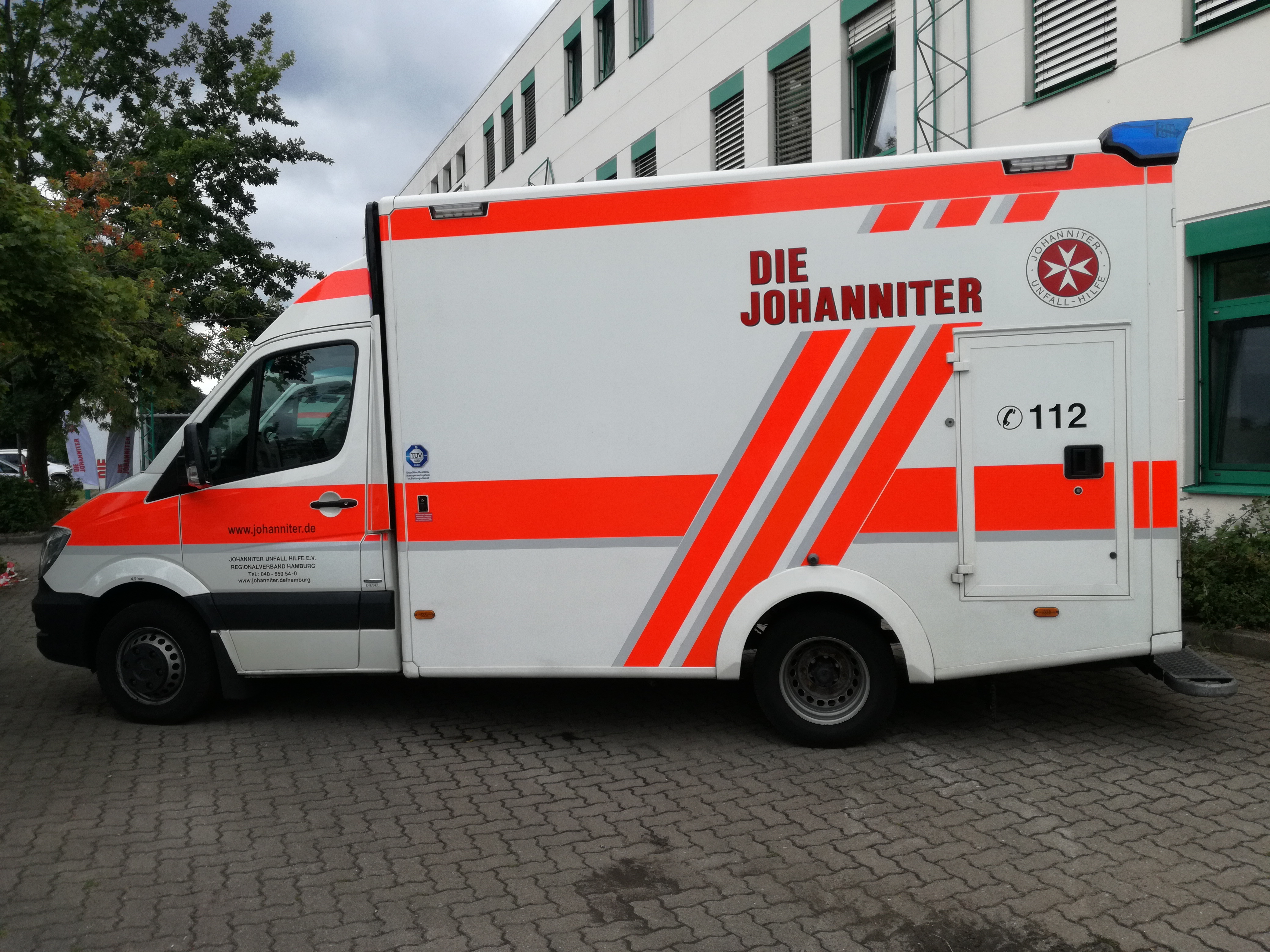 Rettungswagen der Johanniter auf Mercedes Sprinter Basis mit Kofferaufbau der Firma WAS